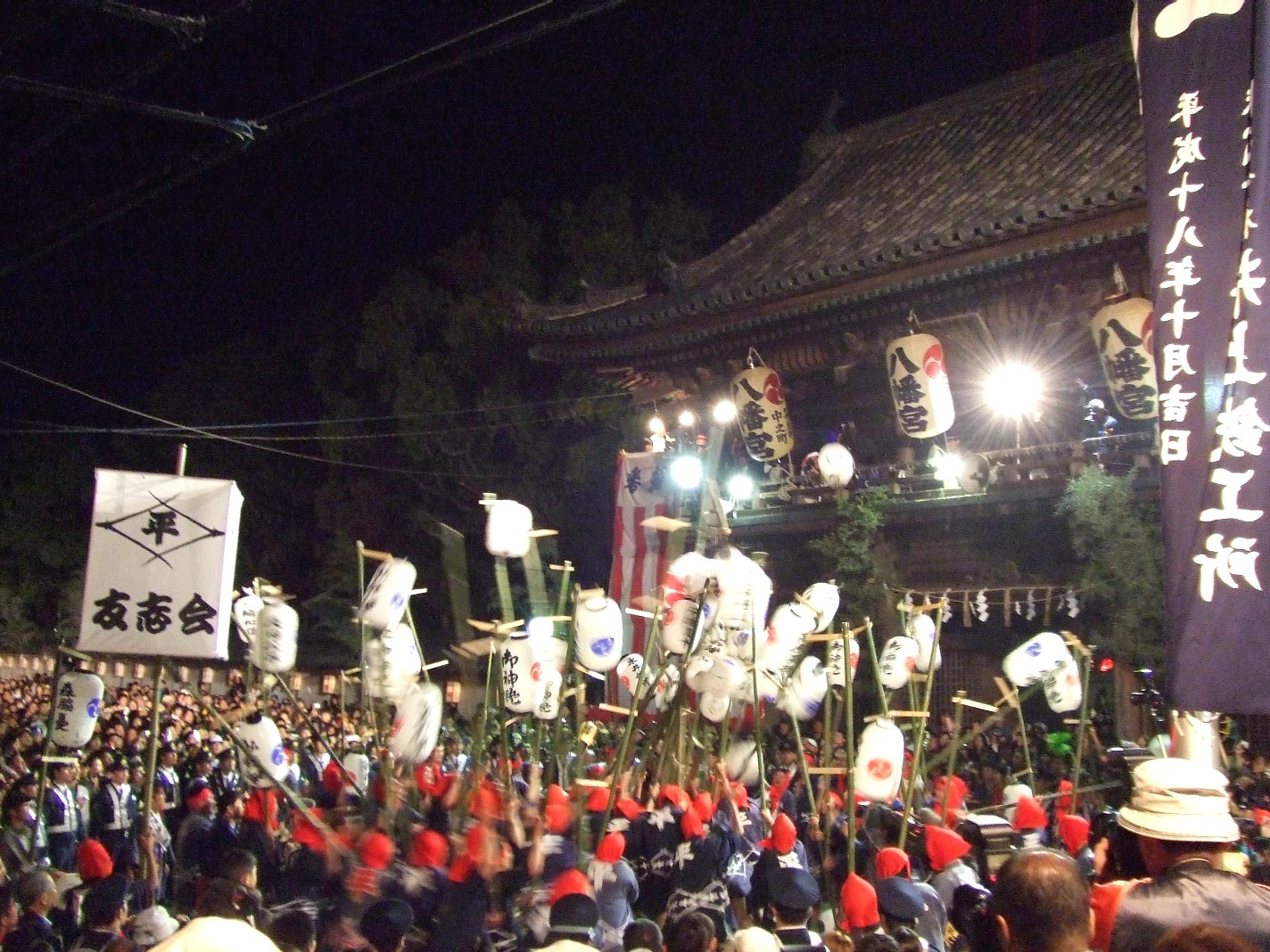 Usuki-hachiman-jinja(魚吹八幡神社) autumn festival